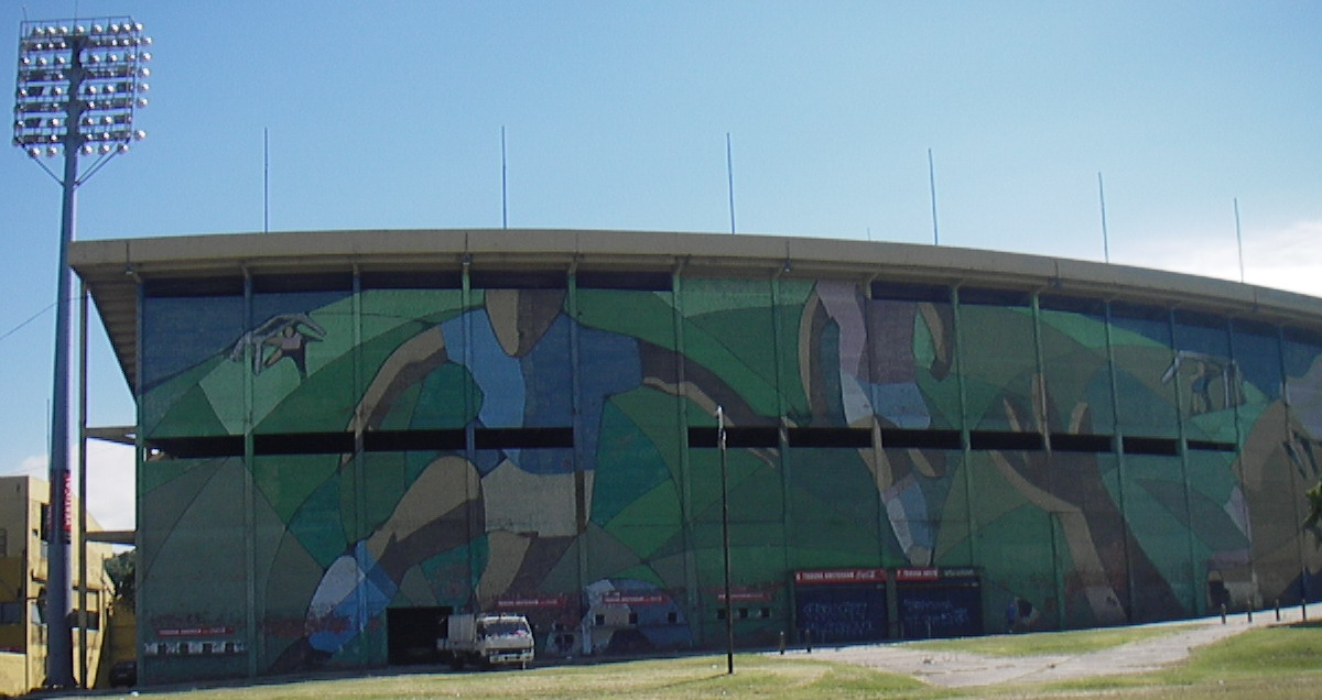 Estadio Centenario (Centenario Stadium)Estadio Centenario